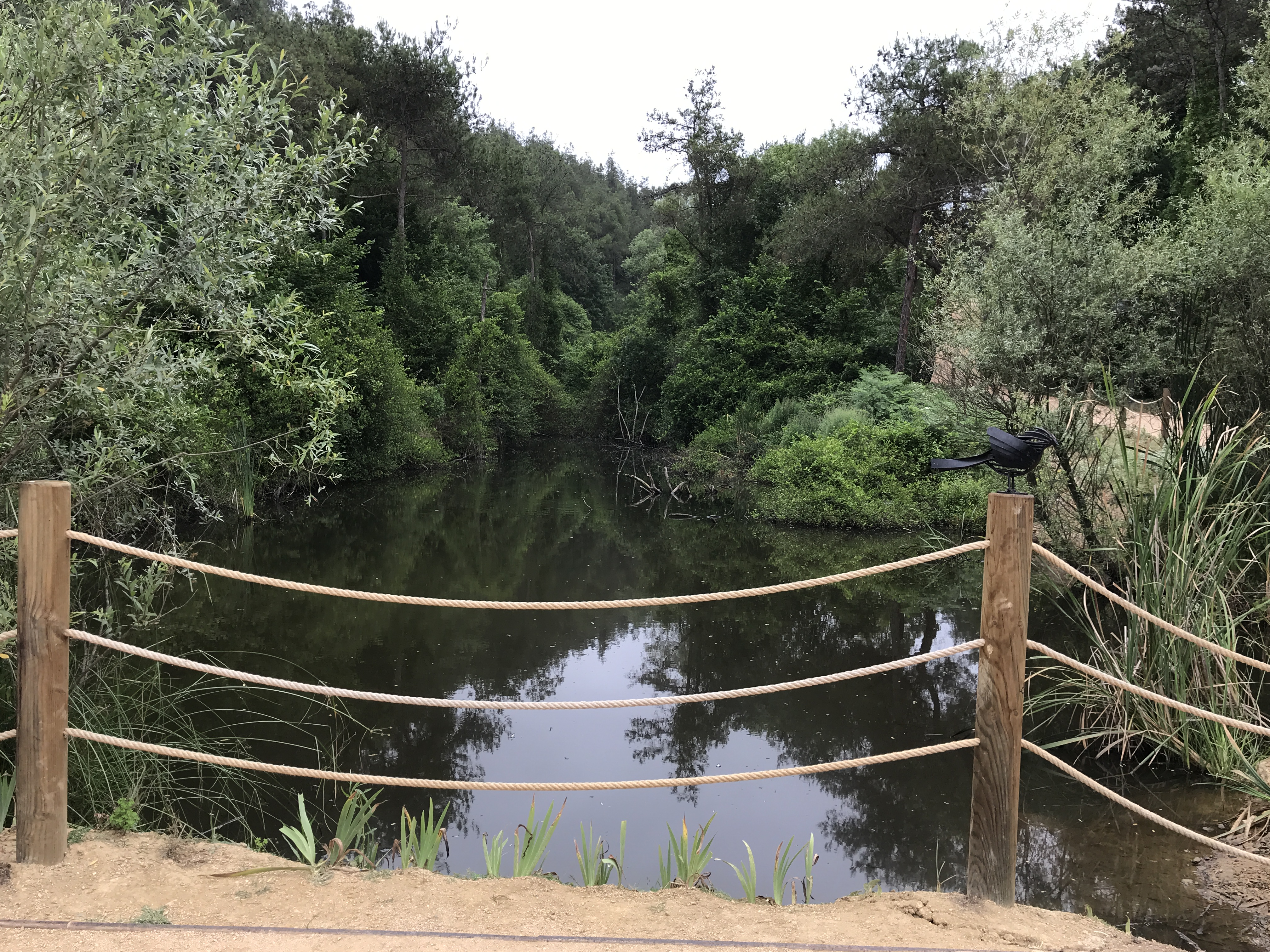 Atatürk Kent Ormanı-Vadidibi Göleti